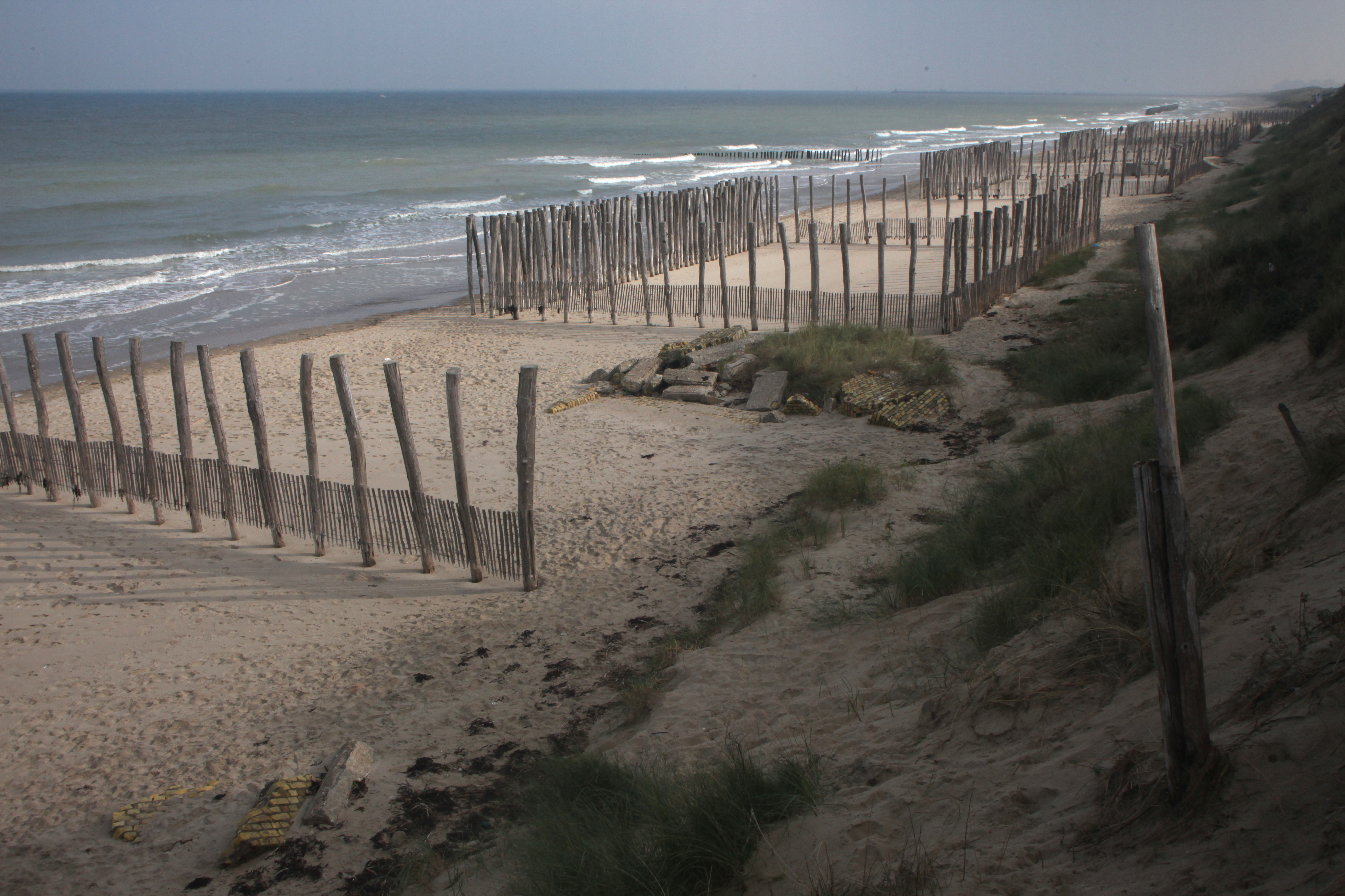 Épis et casiers à sable sur la plage.